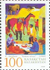 Картина С. Айтбаева "Гости приехали"